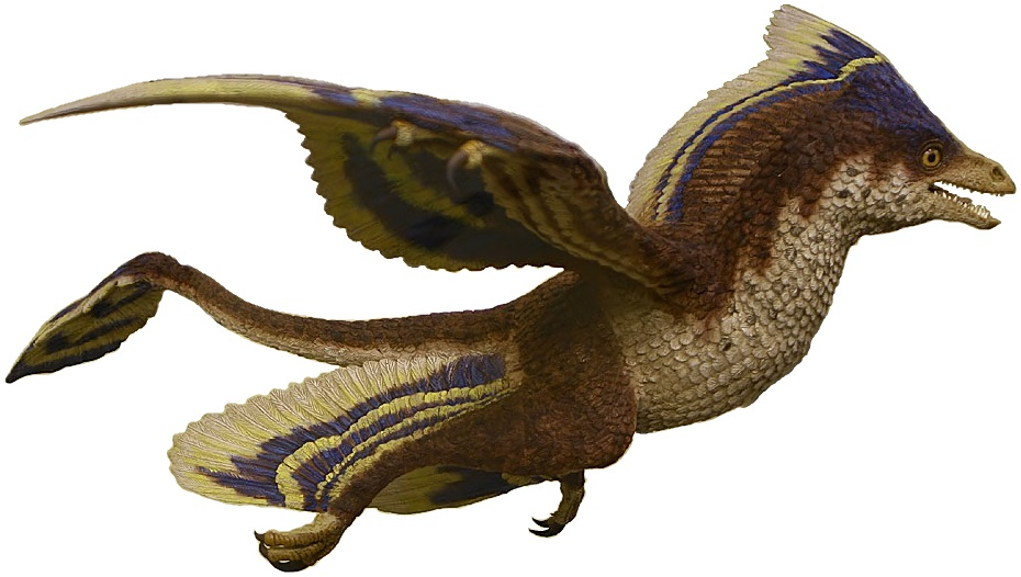 dinosaurio parecido a ave